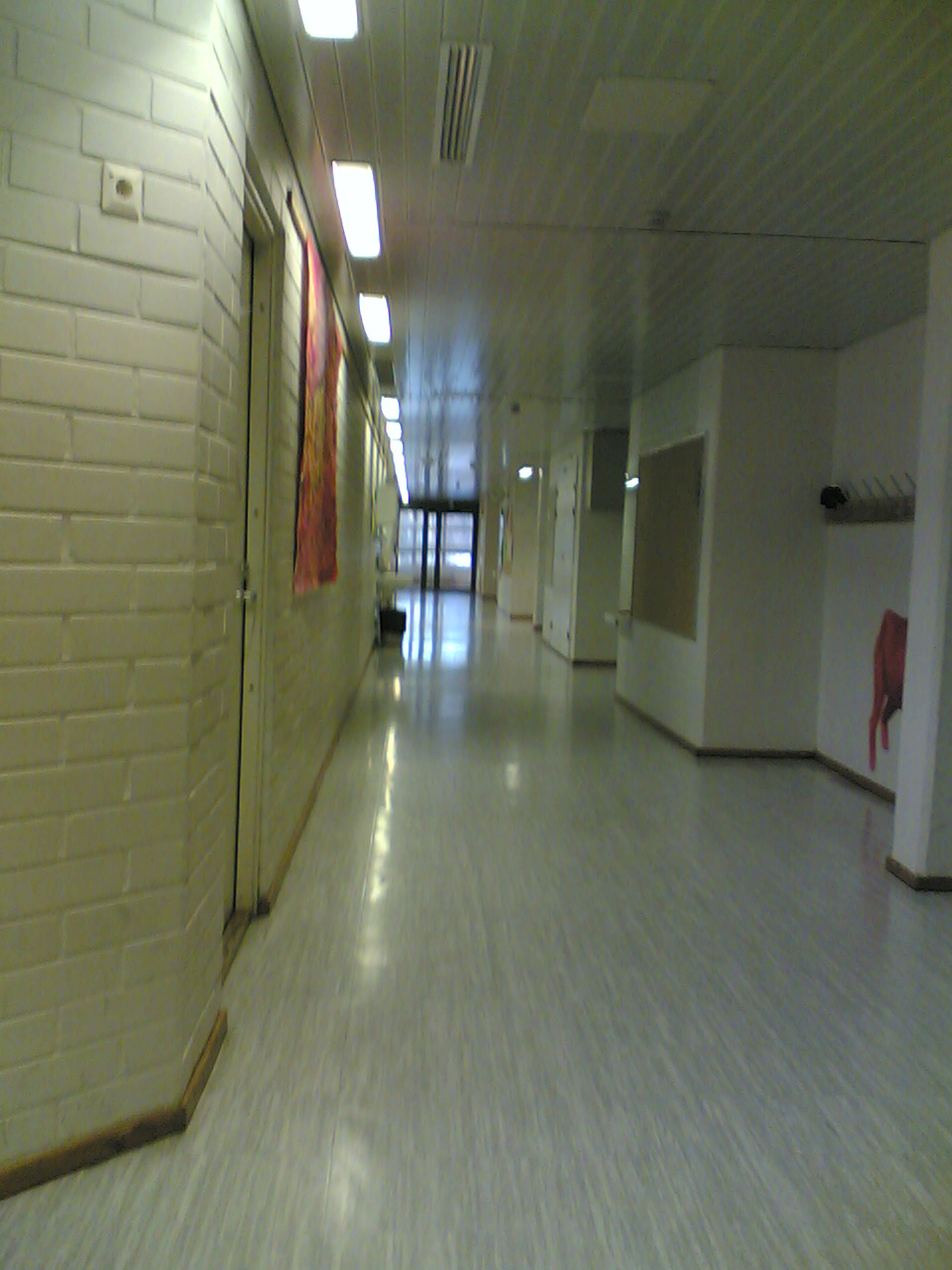 Ehnroosin koulun käytävää.